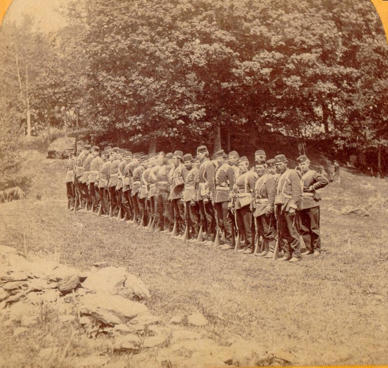 "Fenian Raid, May 1870--Canadian Volunteers Guarding the Line near Richard's Farm."